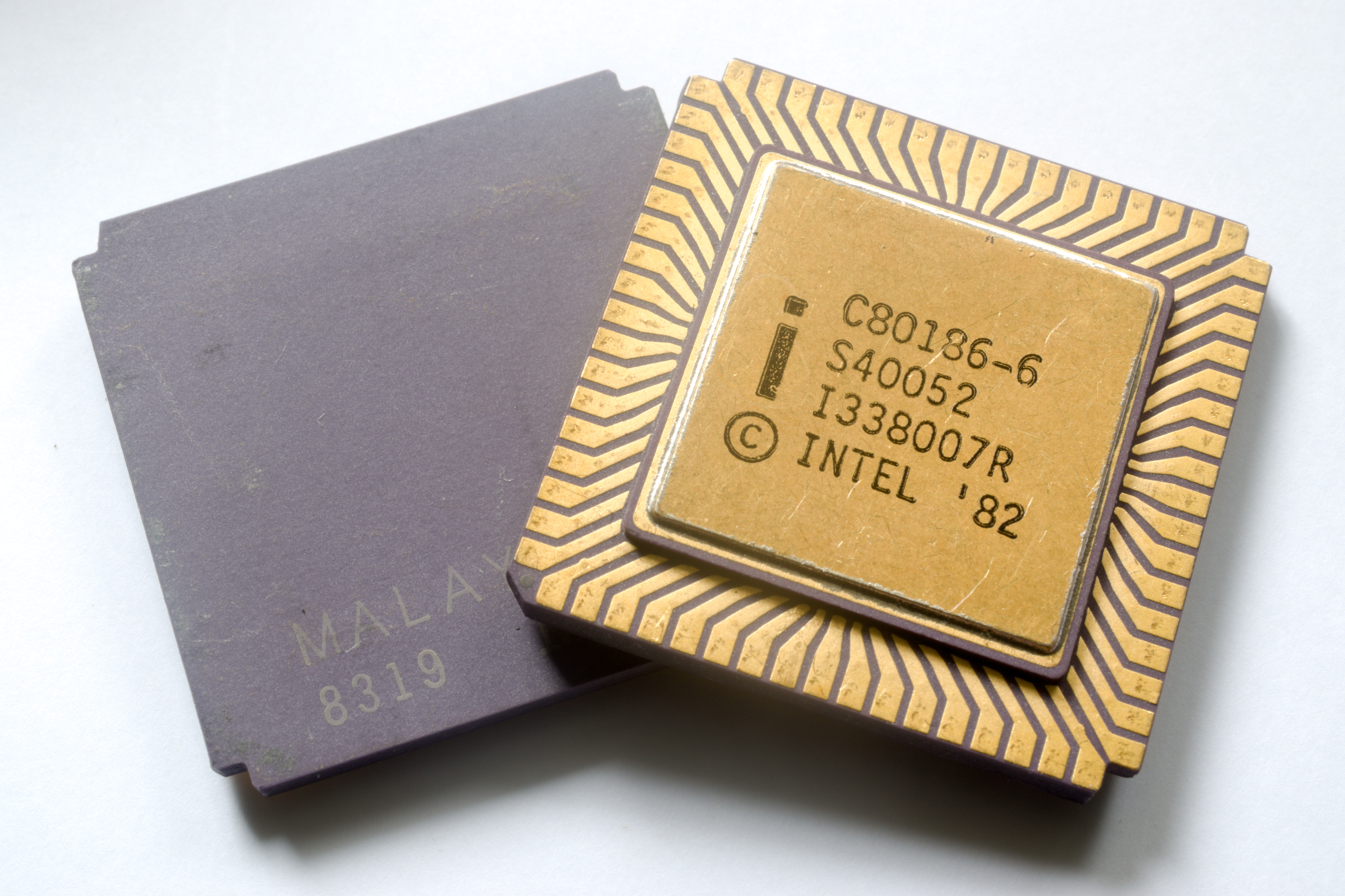 Du Procesoroj Intel 80186 6 MHz, tipo Clcc (C80186-6).